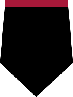 Patka wojsk pancernych i zmechanizowanych używana w latach 1952-1960